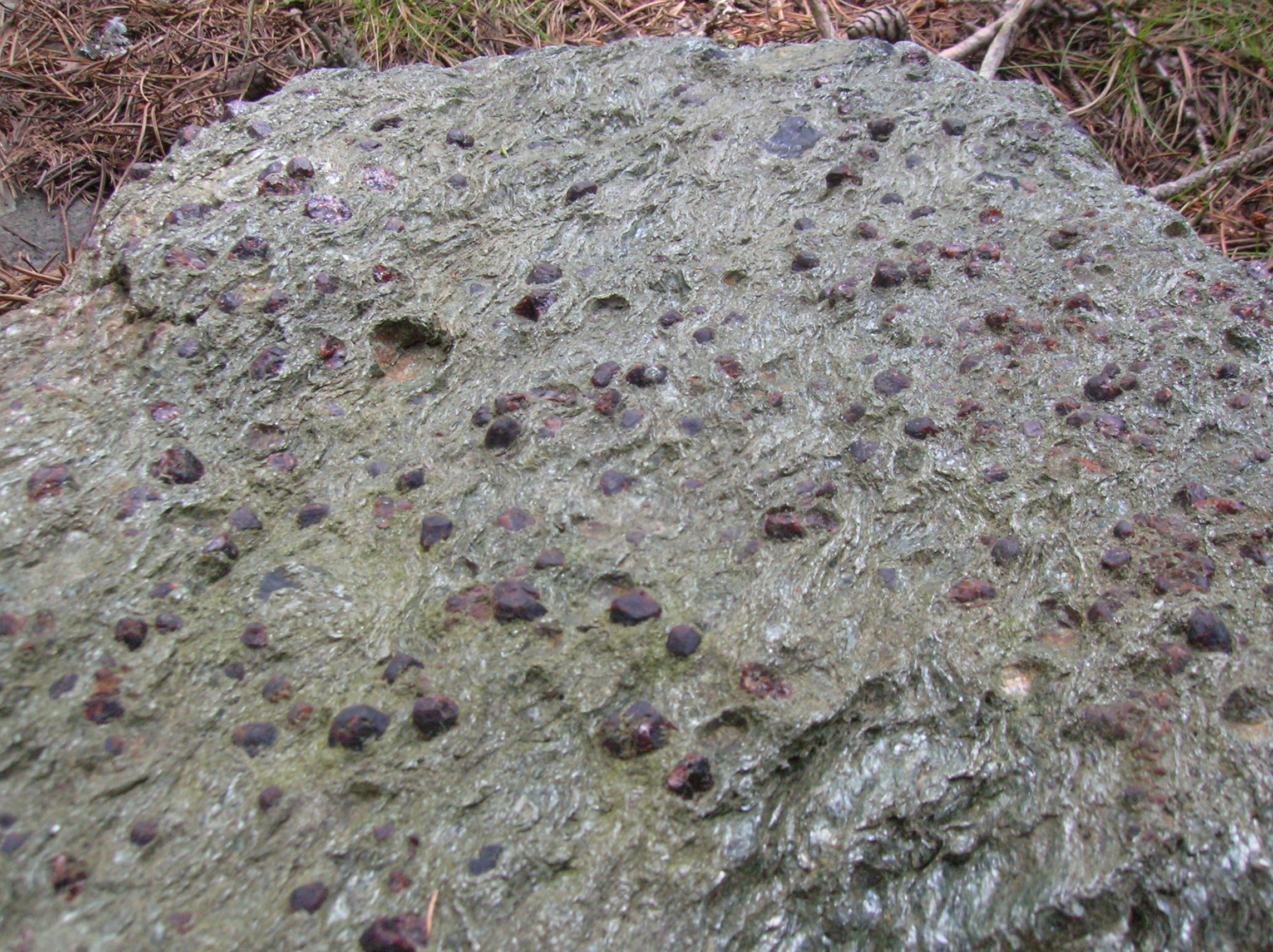 Cava di macine della Valmeriana